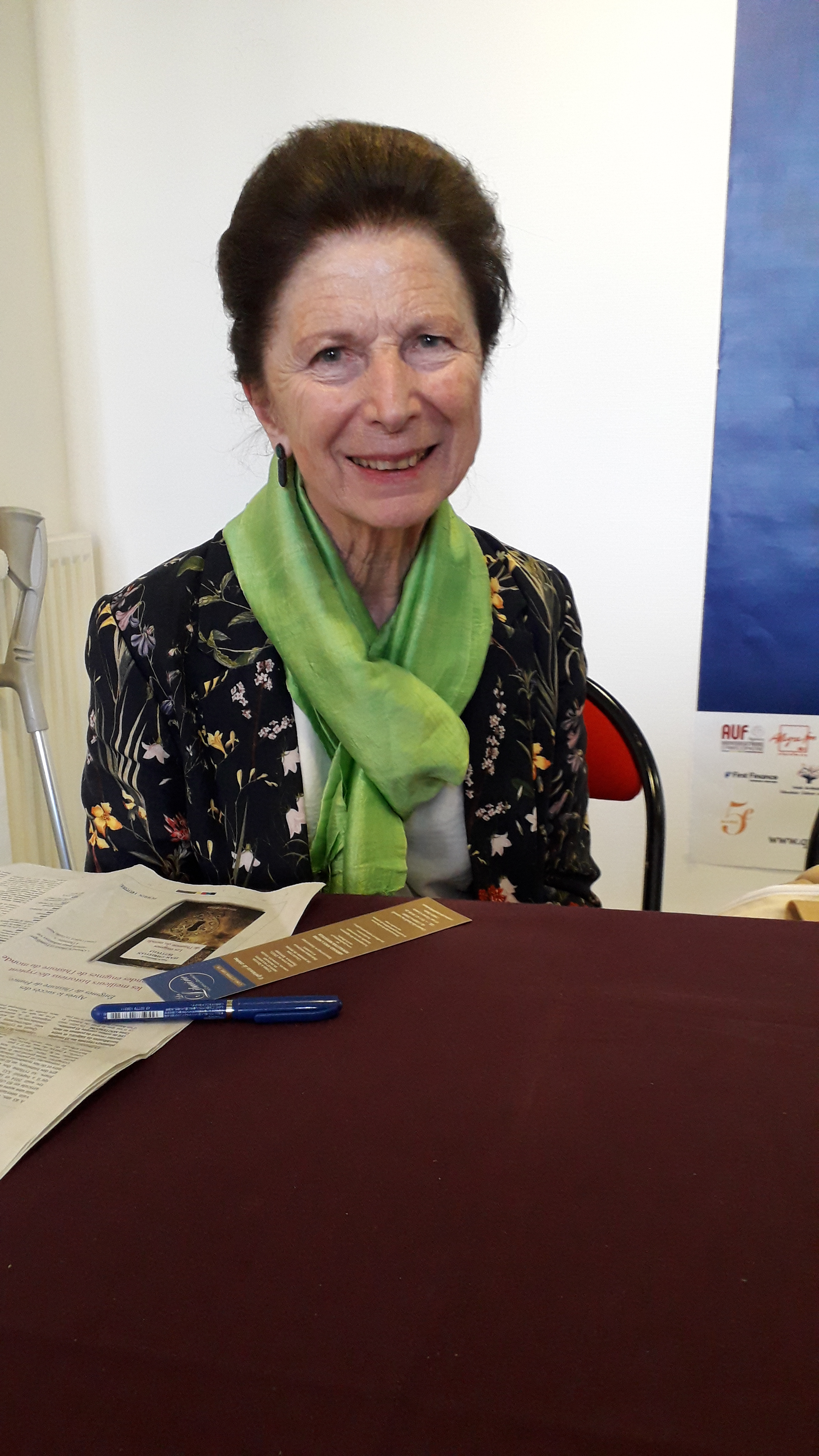 Colette Nys-mazure lors du Quartier du Livre à la Mairie du 5e le 16 mai 2019.